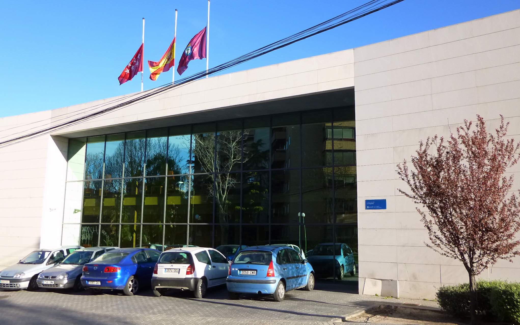 Centro de Día La Magdalena (para mayores con Alzheimer), en Carabanchel, Madrid